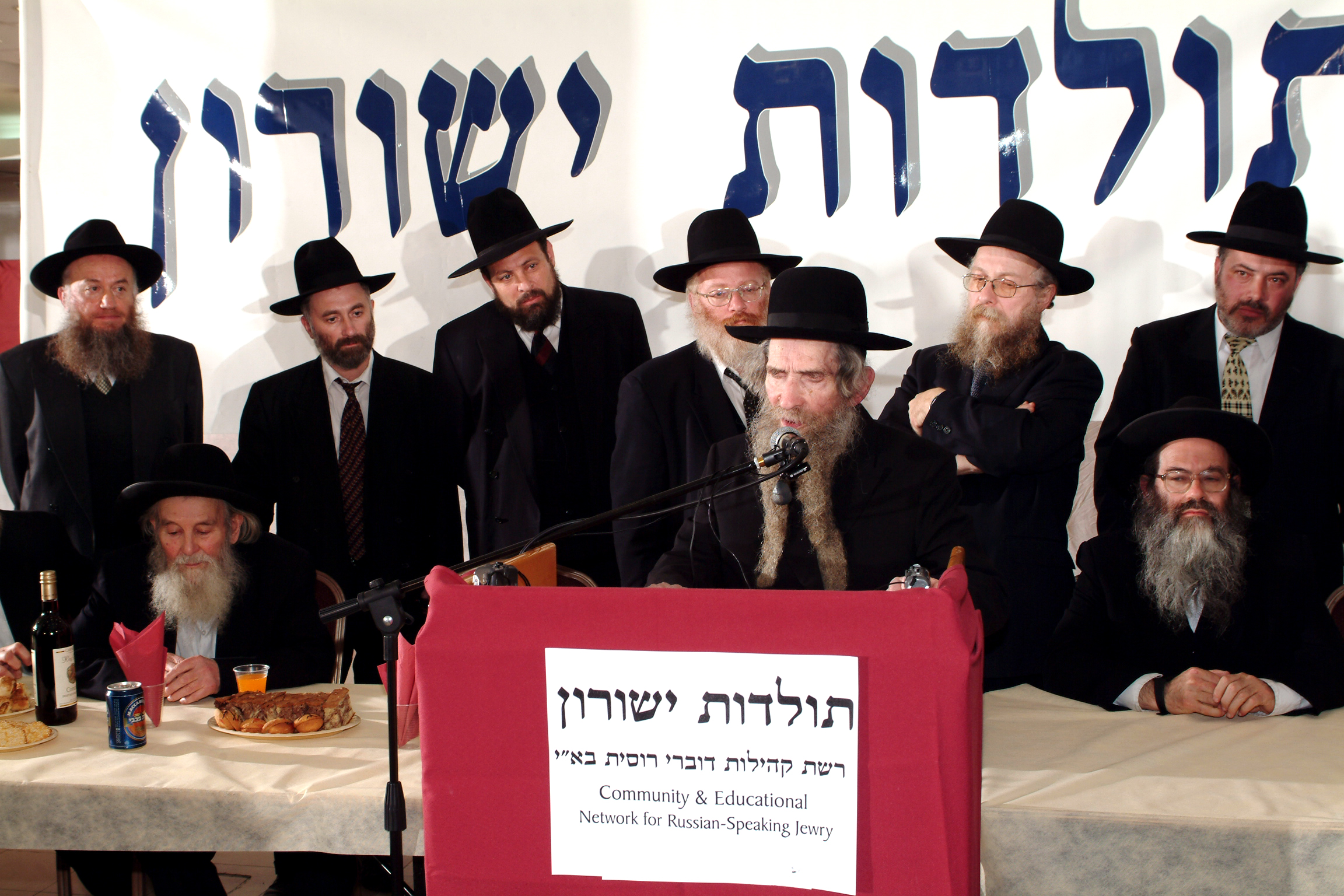 Вечер "Толдот Йешурун" при участии крупнейших израильских раввинов р. Штейнмана, р. Левенштейна, р. Розенгартена и других